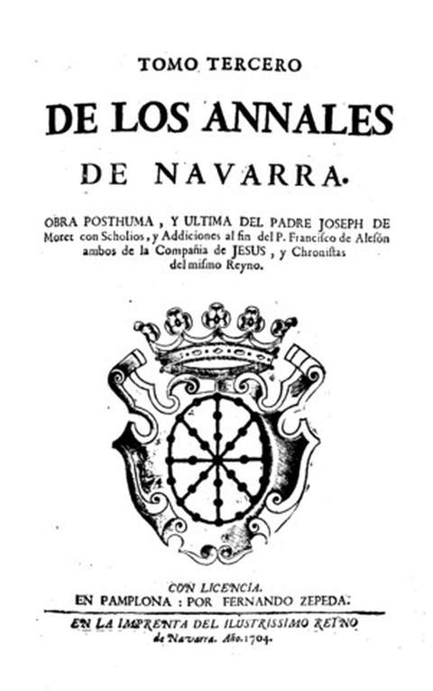 Aleson, Anales del reino de Navarra, tomo III. Francisco Antonio de Neira, 1704